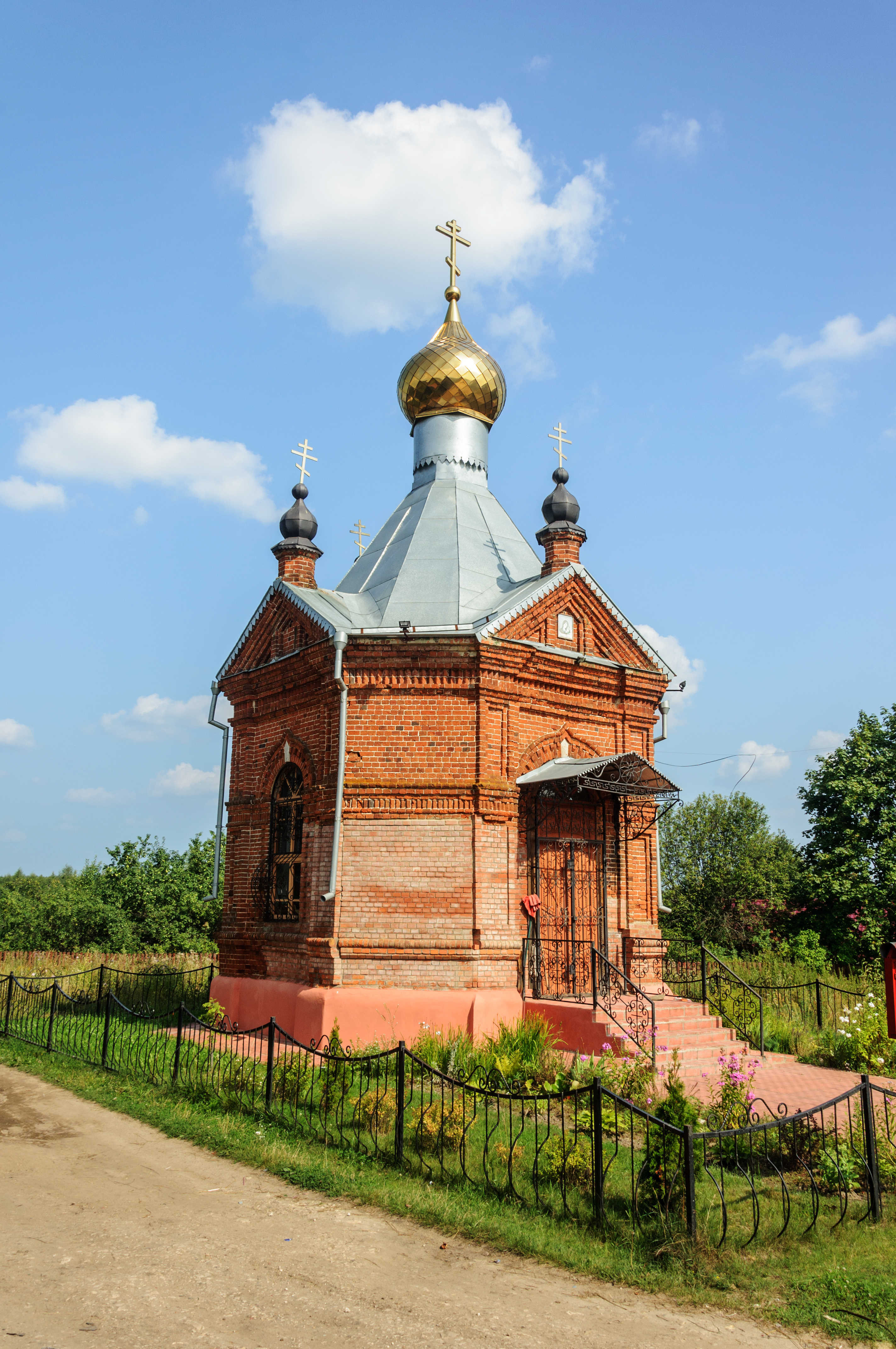 Часовня: Тельвяково, Киржачский район, Владимирская область